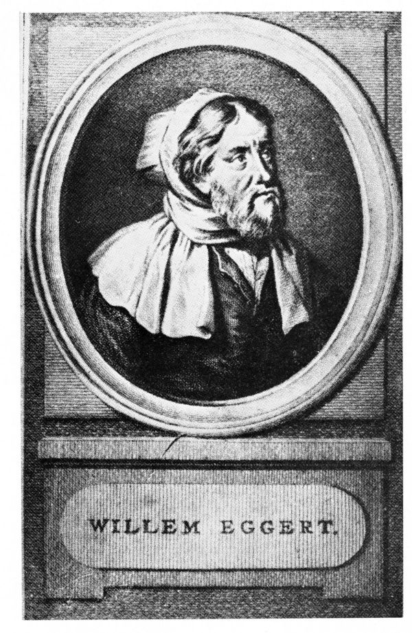 Willem Eggert (Amsterdam, omstreeks 1360 - Purmerend, 15 juli 1417)